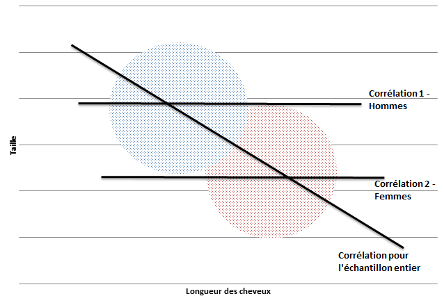 Schéma montrant les corrélations existant entre les variables taille et longueur des cheveux, au sein des groupes (ou de l'échantillon entier). Source: Black and White or Shades of Gray: Are Gender Differences Categorical or Dimensional? Harry T. Reis and Bobbi J. Carothers; 2014.